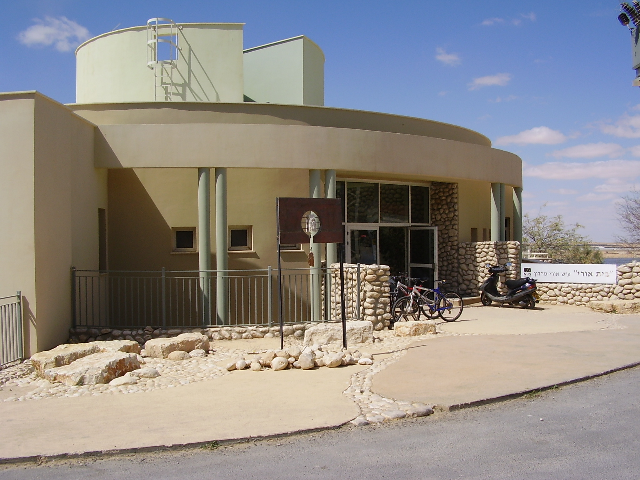 בית אורי גורדון בניצנה